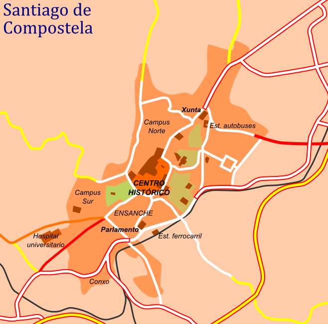 Accesos de Santiago de Compostela